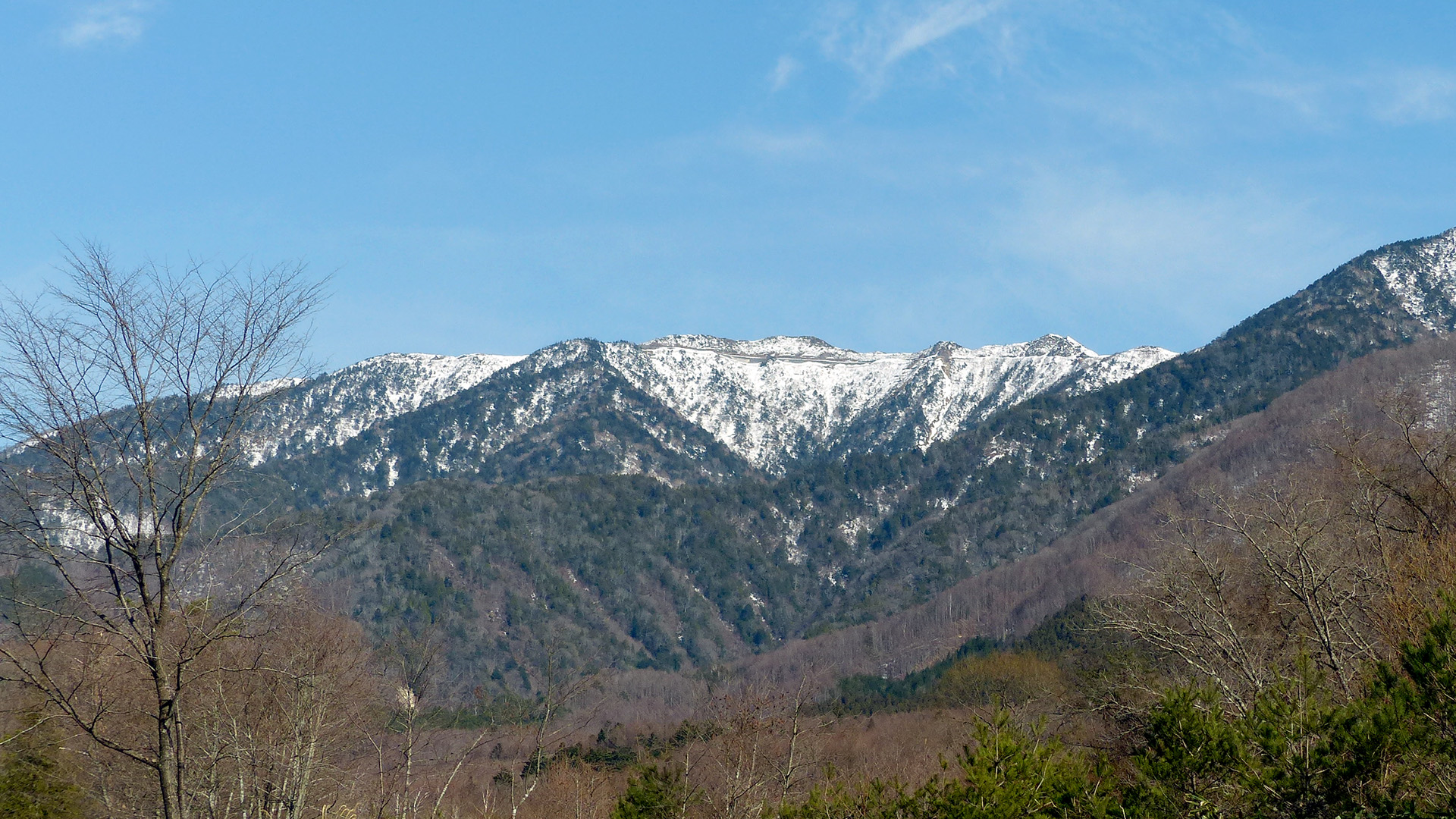 日光市横川から見た大佐飛山地。鹿又岳の稜線付近の山肌に栃木県道266号中塩原板室那須線の廃道区画（塩那道路）が見える。